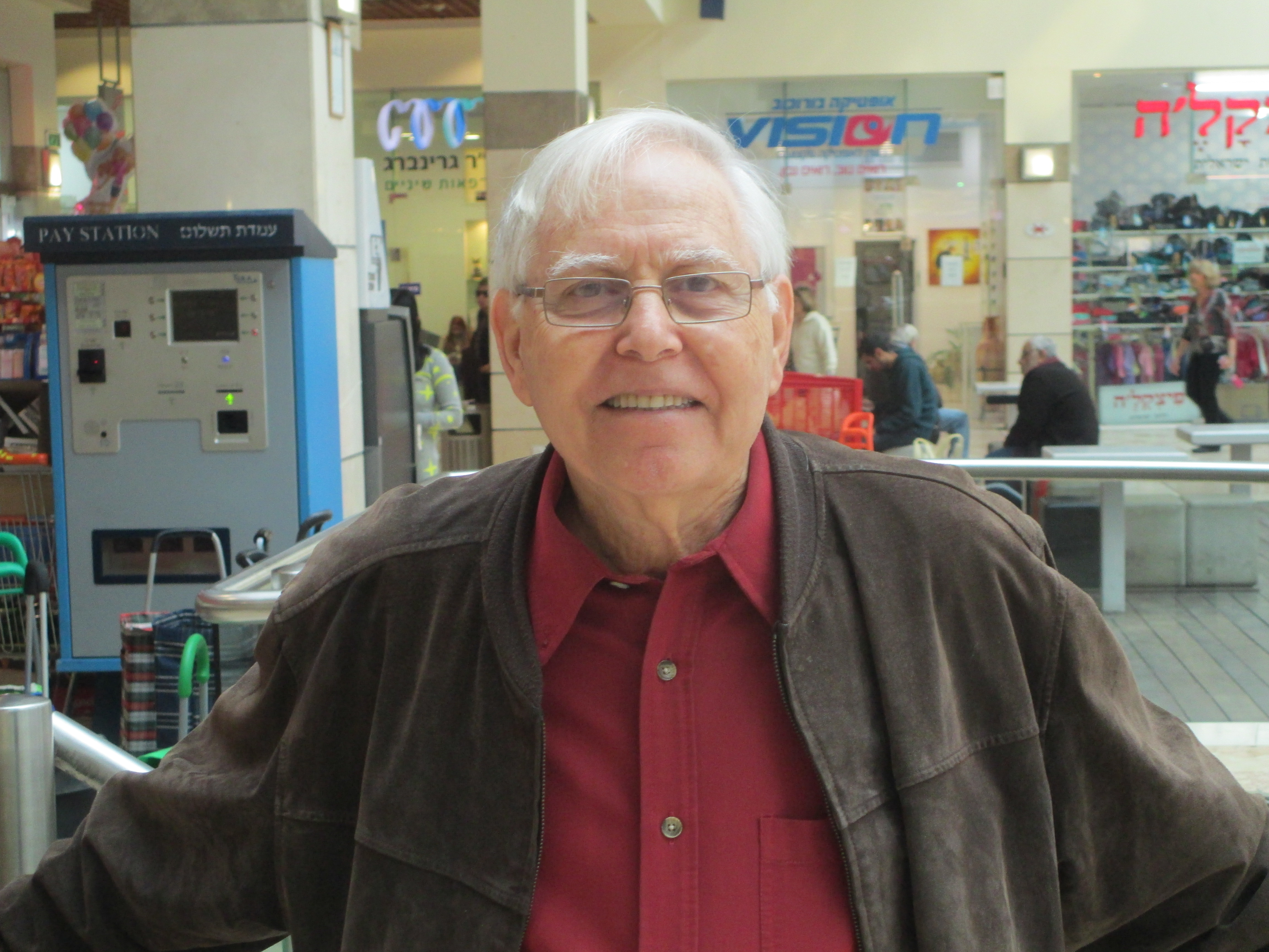 המלחין והאקודיוניסט יוסף (יוסל'ה) אורג